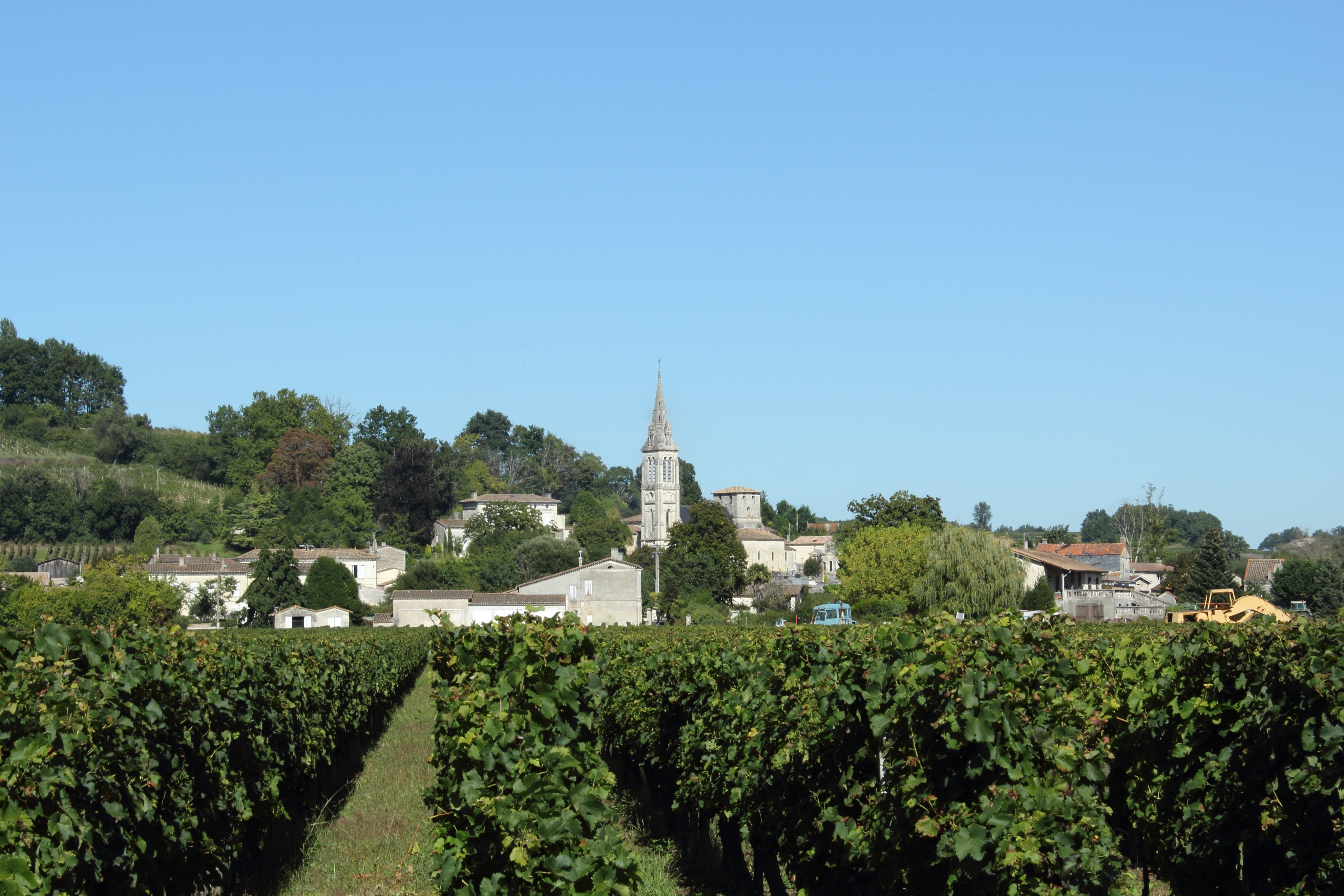 Vue du bourg de Saint-Michel de Fronsac depuis les vignes